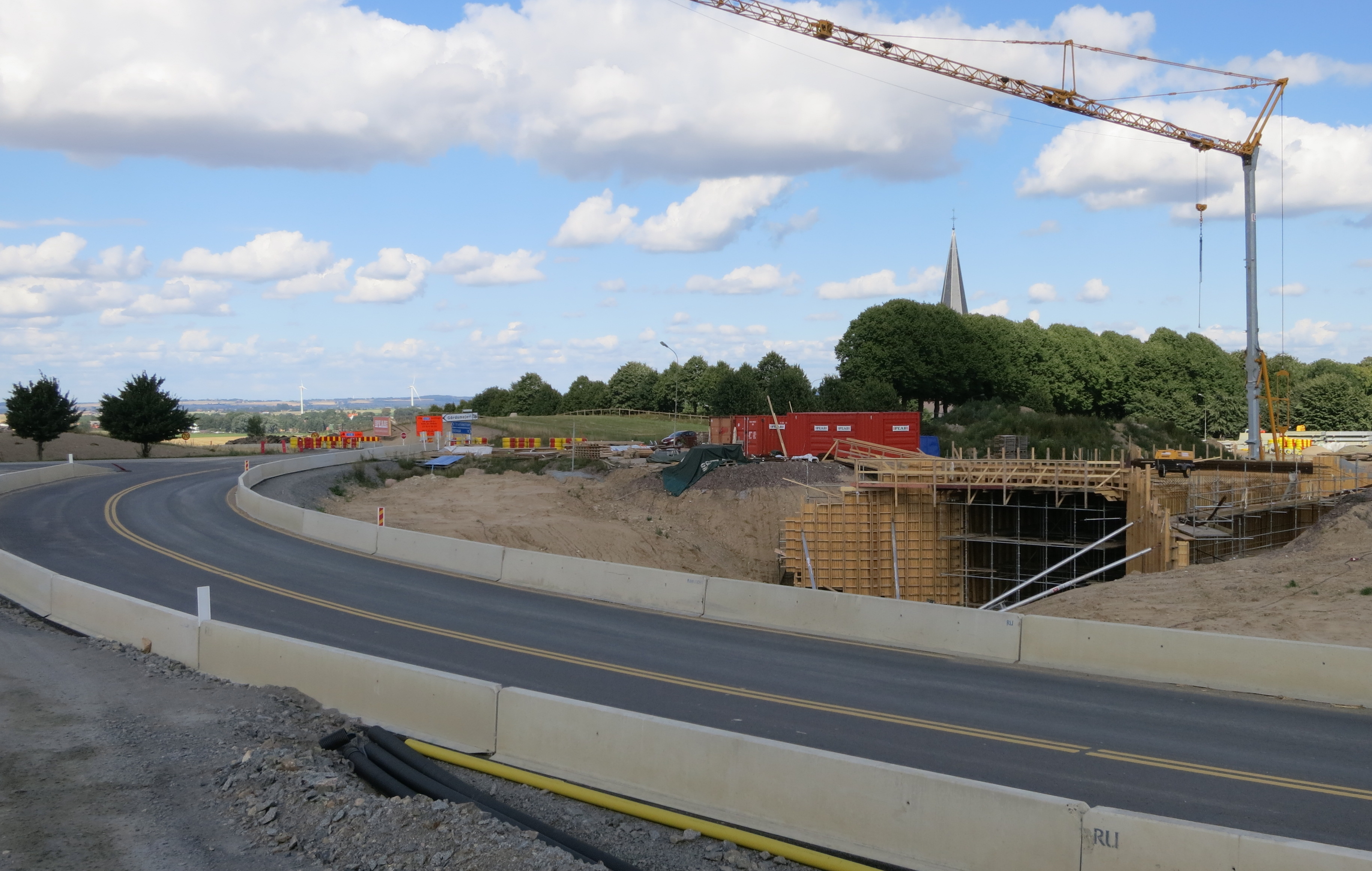 En planfri korsning under Länsväg 108 byggs i Hyby